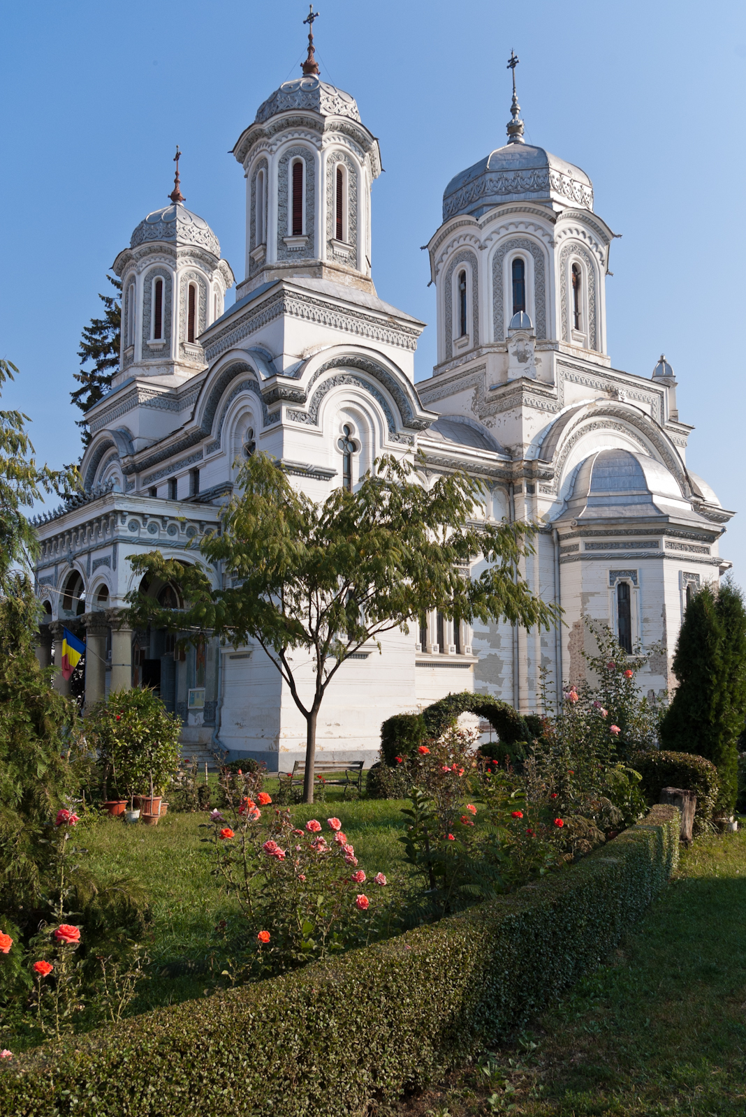 Fotografia prezinta Biserica "Sf. Vineri" din Pitesti vazuta dinspre S. 01